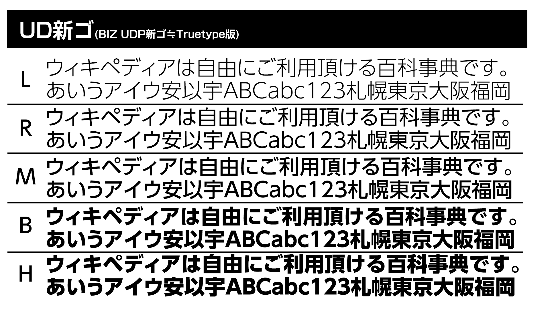 正確にはBIZ UDP新ゴ(TrueType)ですがタイプフェースはほぼ同じです。